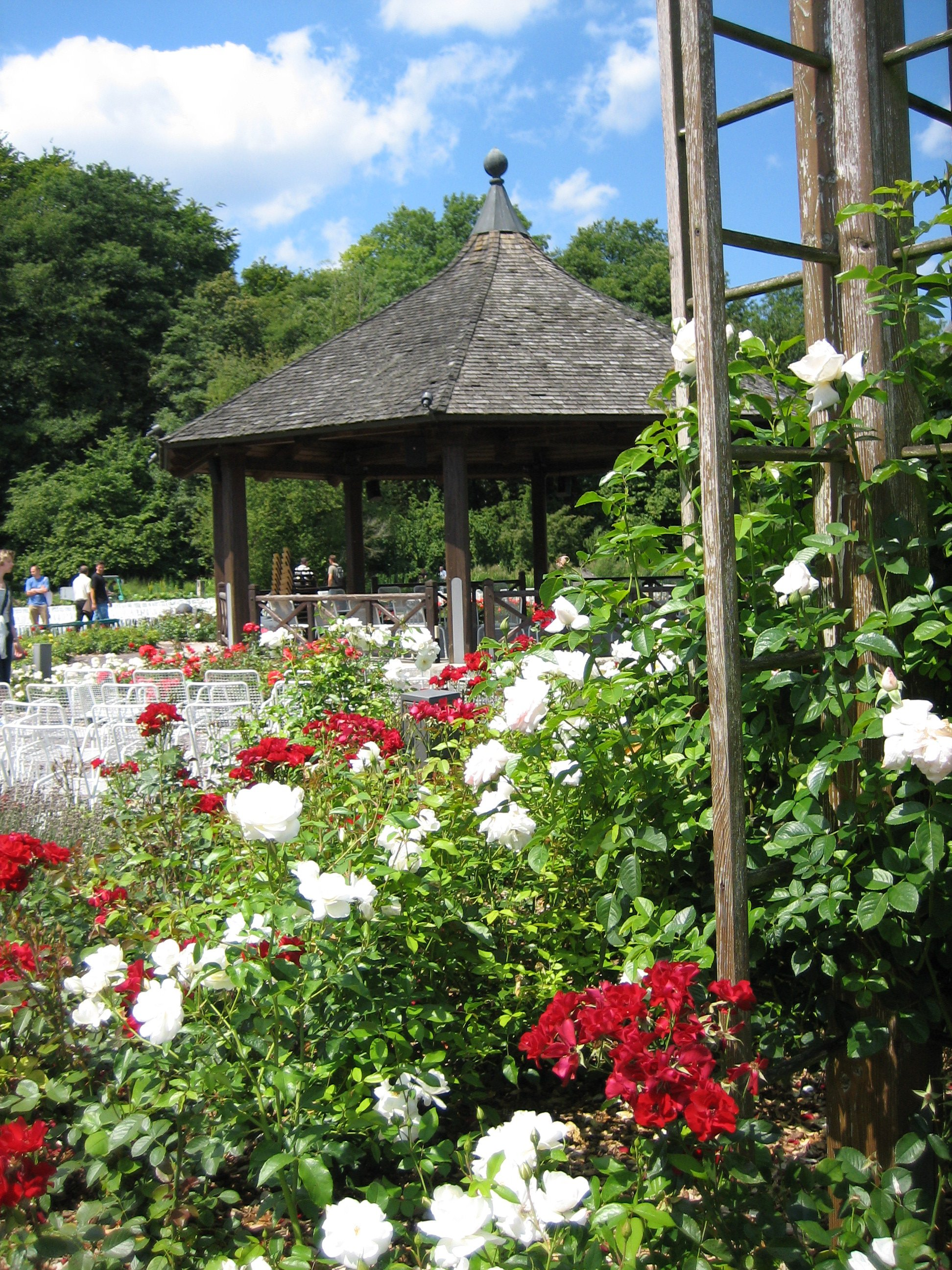 Botanischer Garten in Augsburg, der Pavillon beim Rosengarten